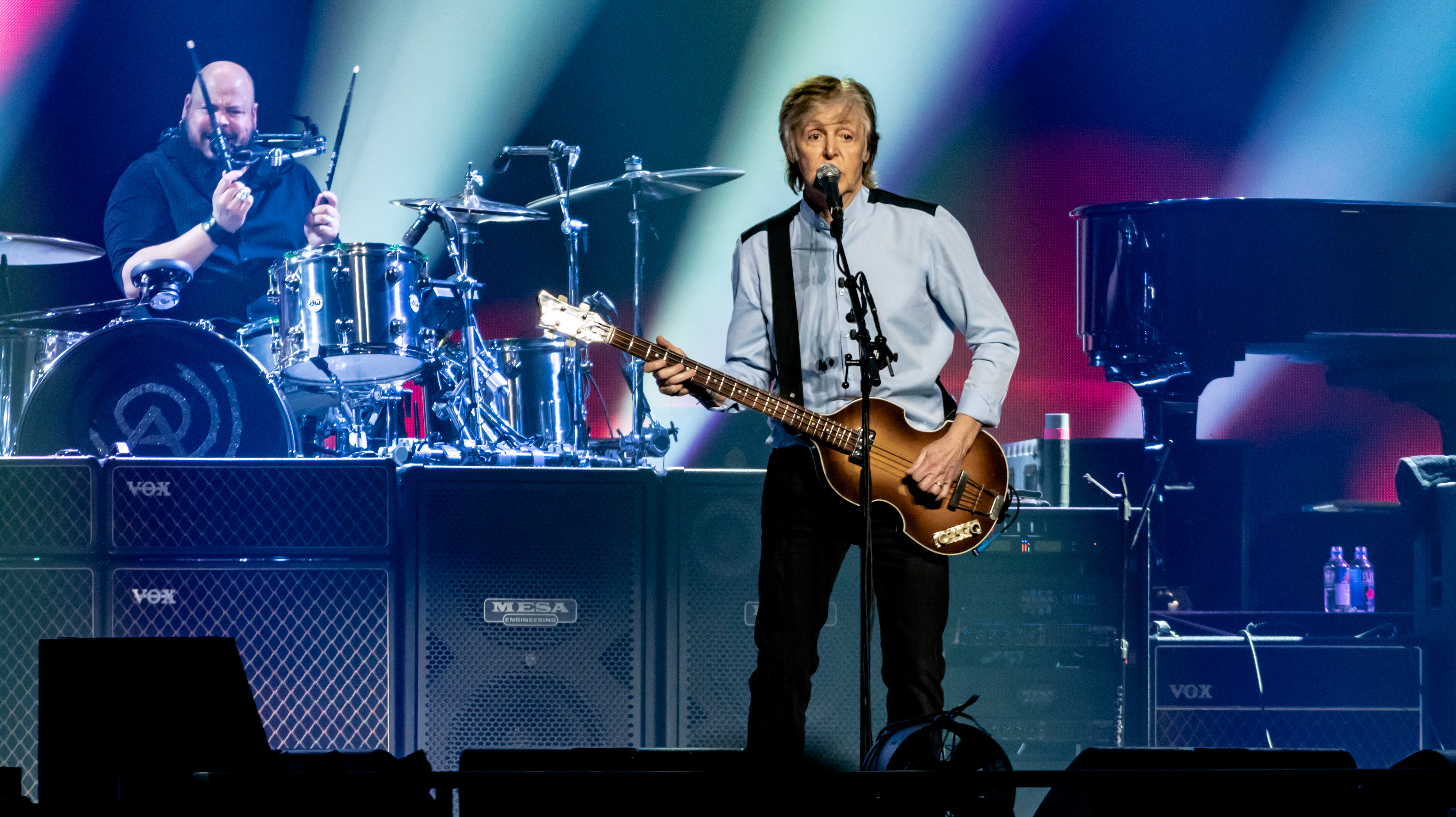 MaccaO2161218-97